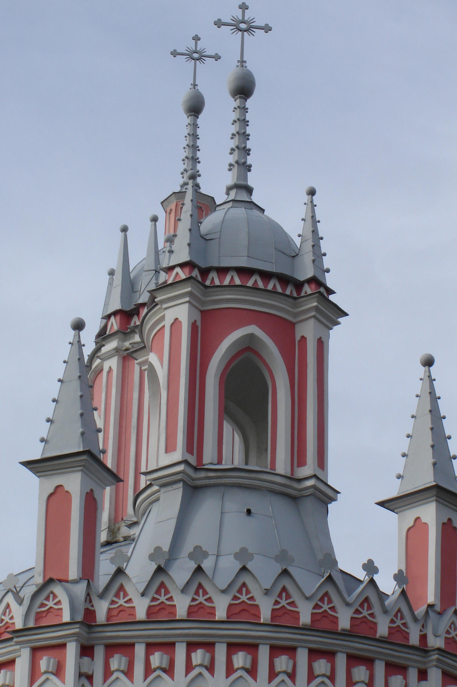 Церковь Рождества Иоанна Предтечи (Чесменская). Восточная колокольня.